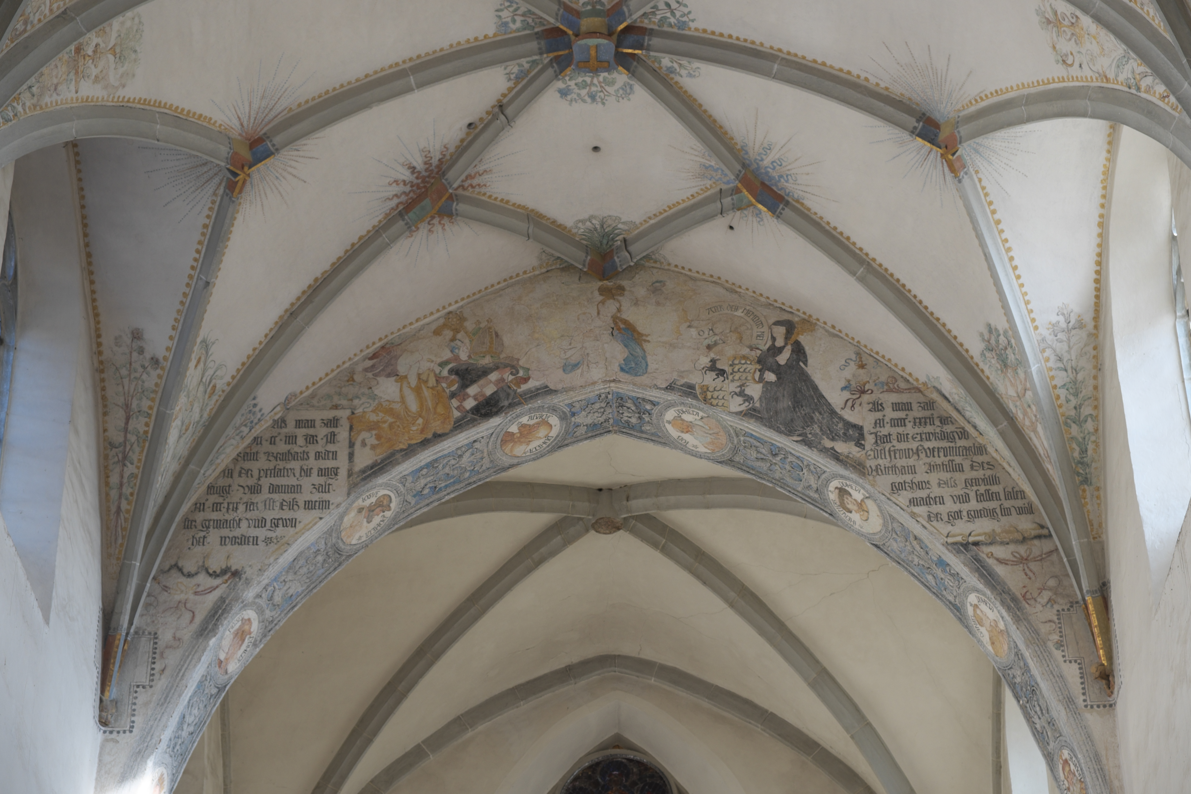 Katholische Pfarrkirche St. Anna, ehemalige Kirche des Zisterzienserinnenklosters in Heiligkreuztal (Altheim) im Landkreis Biberach (Baden-Württemberg/Deutschland), Chorbogen